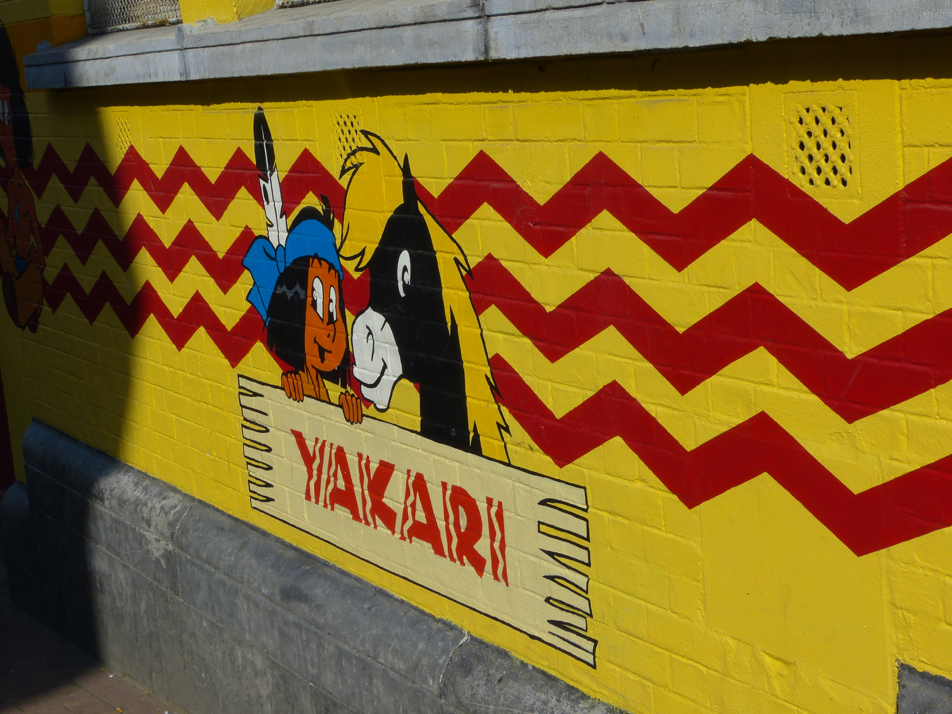 Stripmuur Yakari (detail) te Sint-Gillis (Brussel)